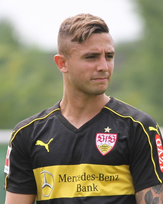 Pablo Maffeo beim offiziellen Trainingsauftakt. Aufgenommen von